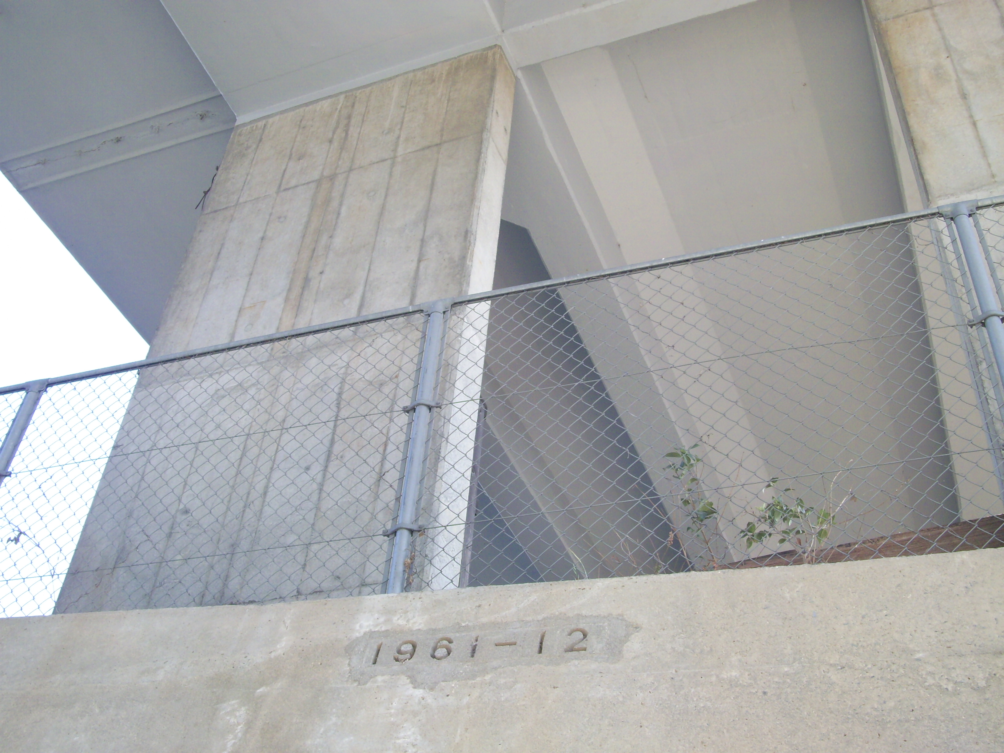 東海道新幹線鴨宮モデル線として造られたことが分かる「1961-12」銘標、第一鴨宮BL（架道橋）の版橋脚を支える擁壁面 ㊟カメラを起動すると日付機能が出荷時のものに初期化されるため、ファイル履歴の撮影日時とメタデータの原画像データの生成日時が異なります